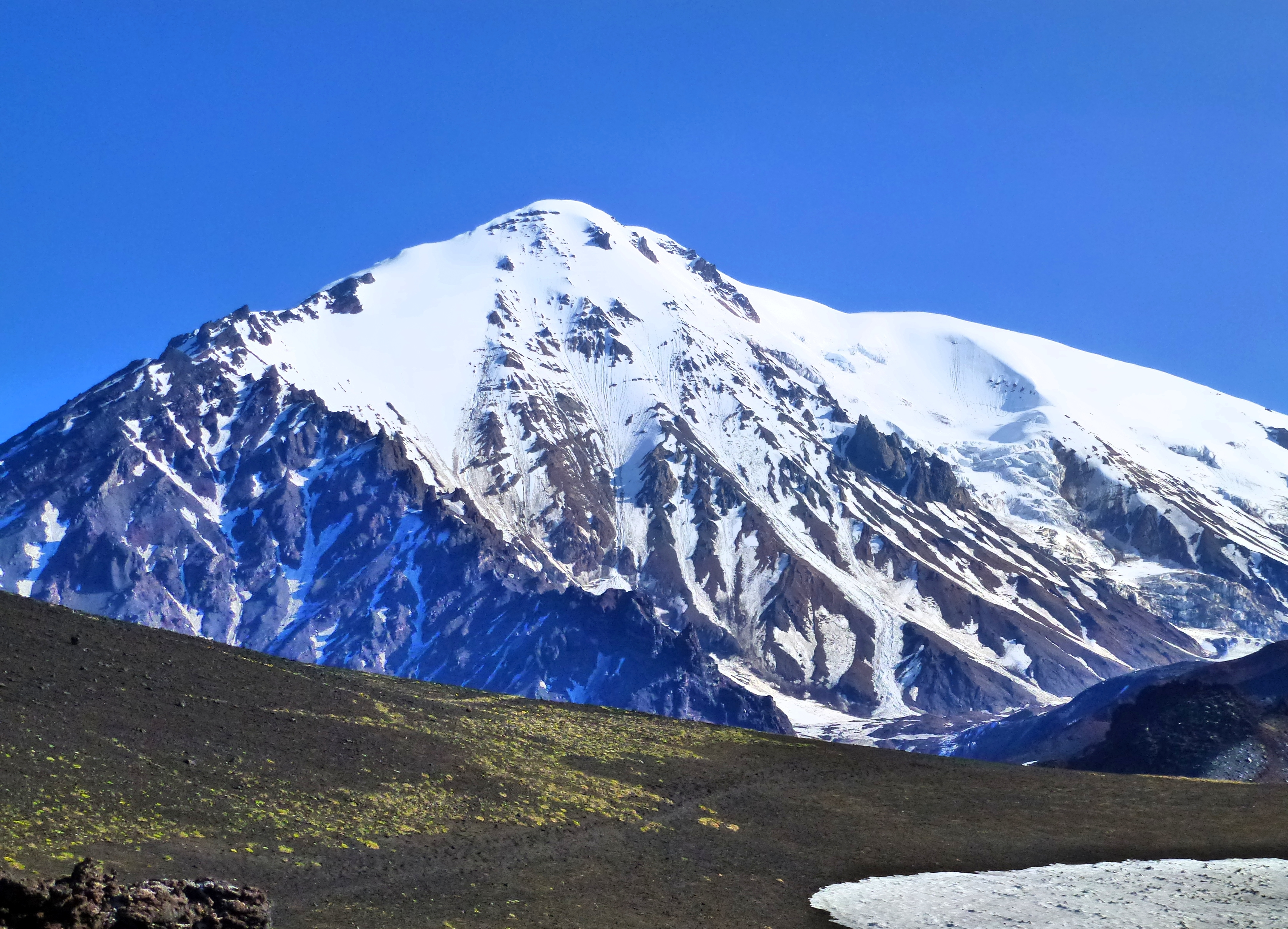 Tolbatschik aus Südwesten